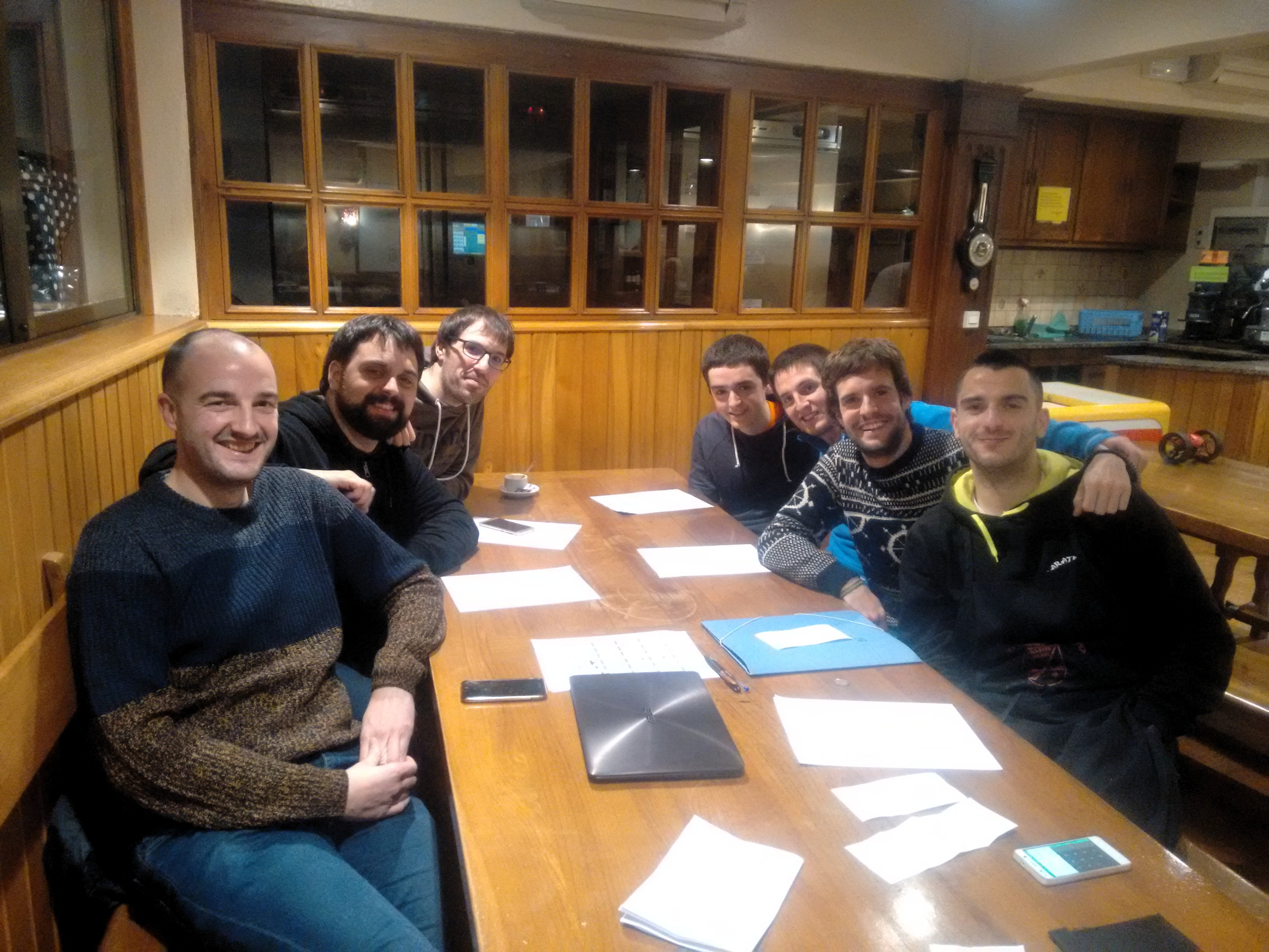 Game Erauntsia elkarteko kideak. Ezkerretik hasita: Iker Ibarguren, Damian Medinabeitia, Xabier Calvo, Bingen Galartza, Ander Intxaurrondo, Urtzi Odriozola eta Garikoitz Larrañaga.